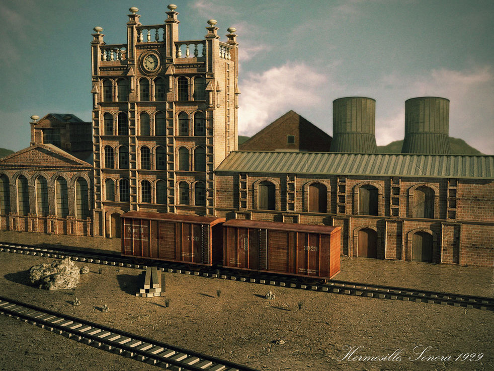 Animación de las instalaciones del Molino La Fama, antiguamente conocido como Molino el Hermosillense.